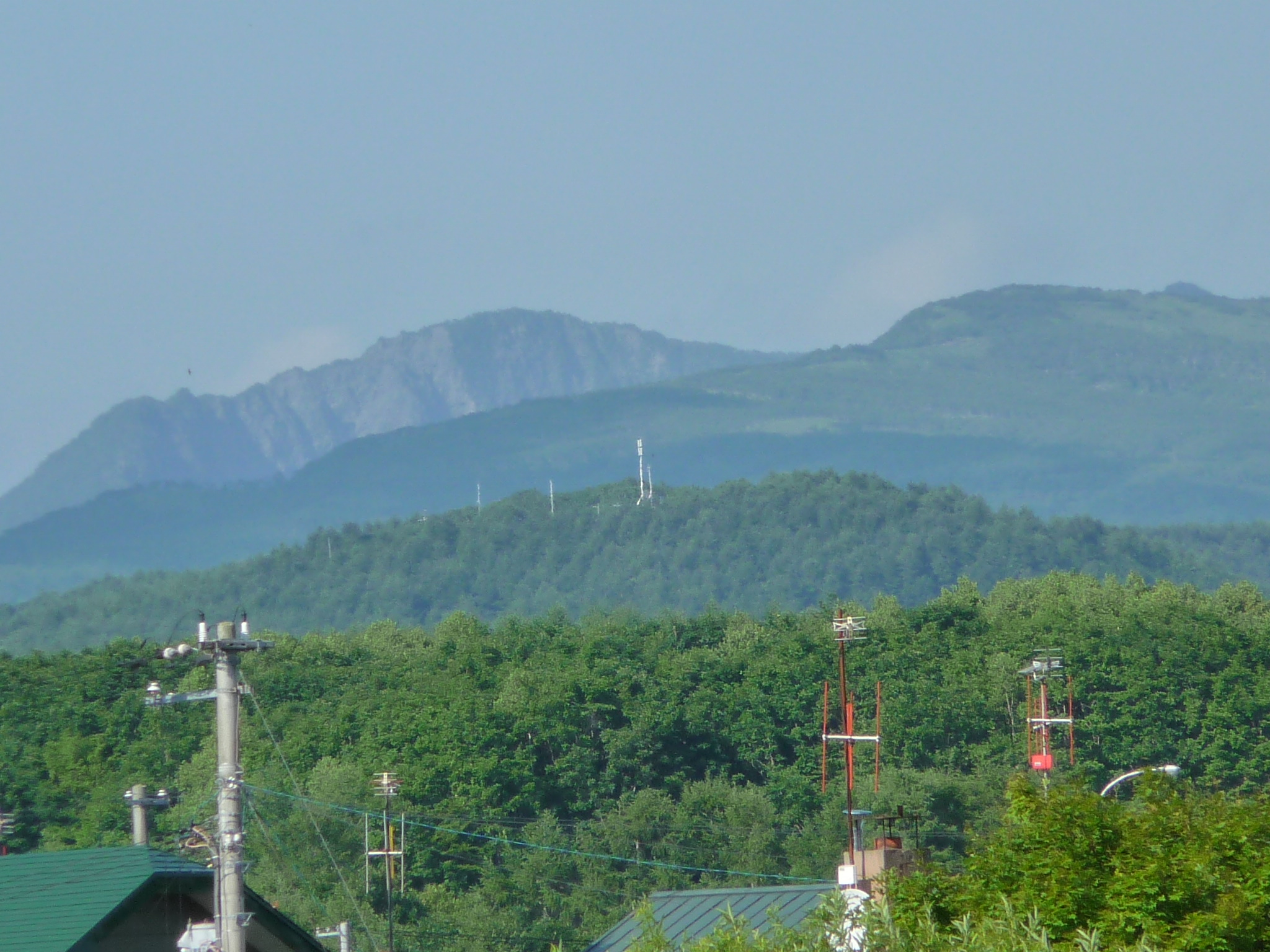 弟子屈町市街地から見た、仁多山にあるTV中継所群。後ろの山は摩周岳。